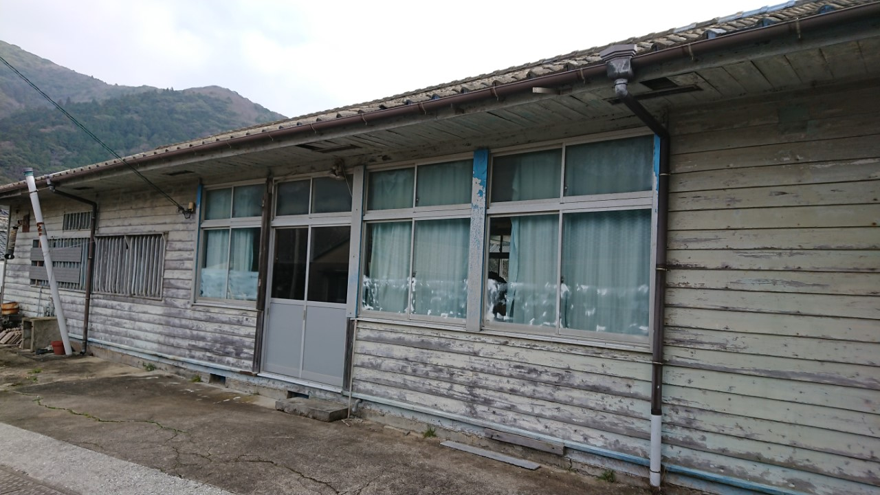 長崎県対馬市厳原町小茂田にある郵便局の旧局舎